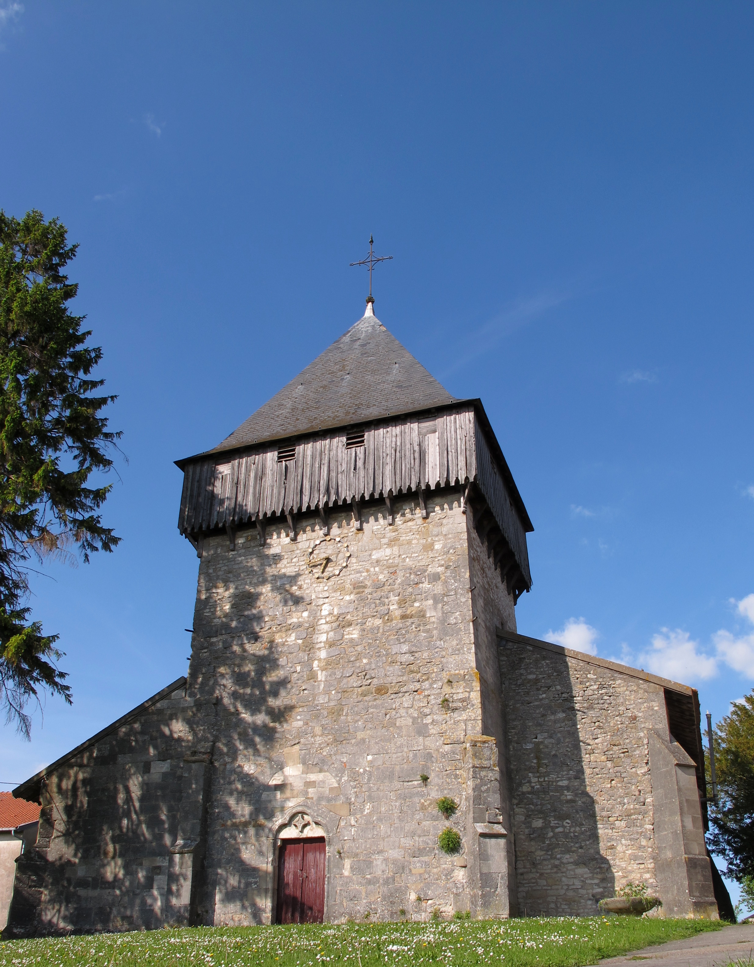 EGLISE DE WOEL (55)